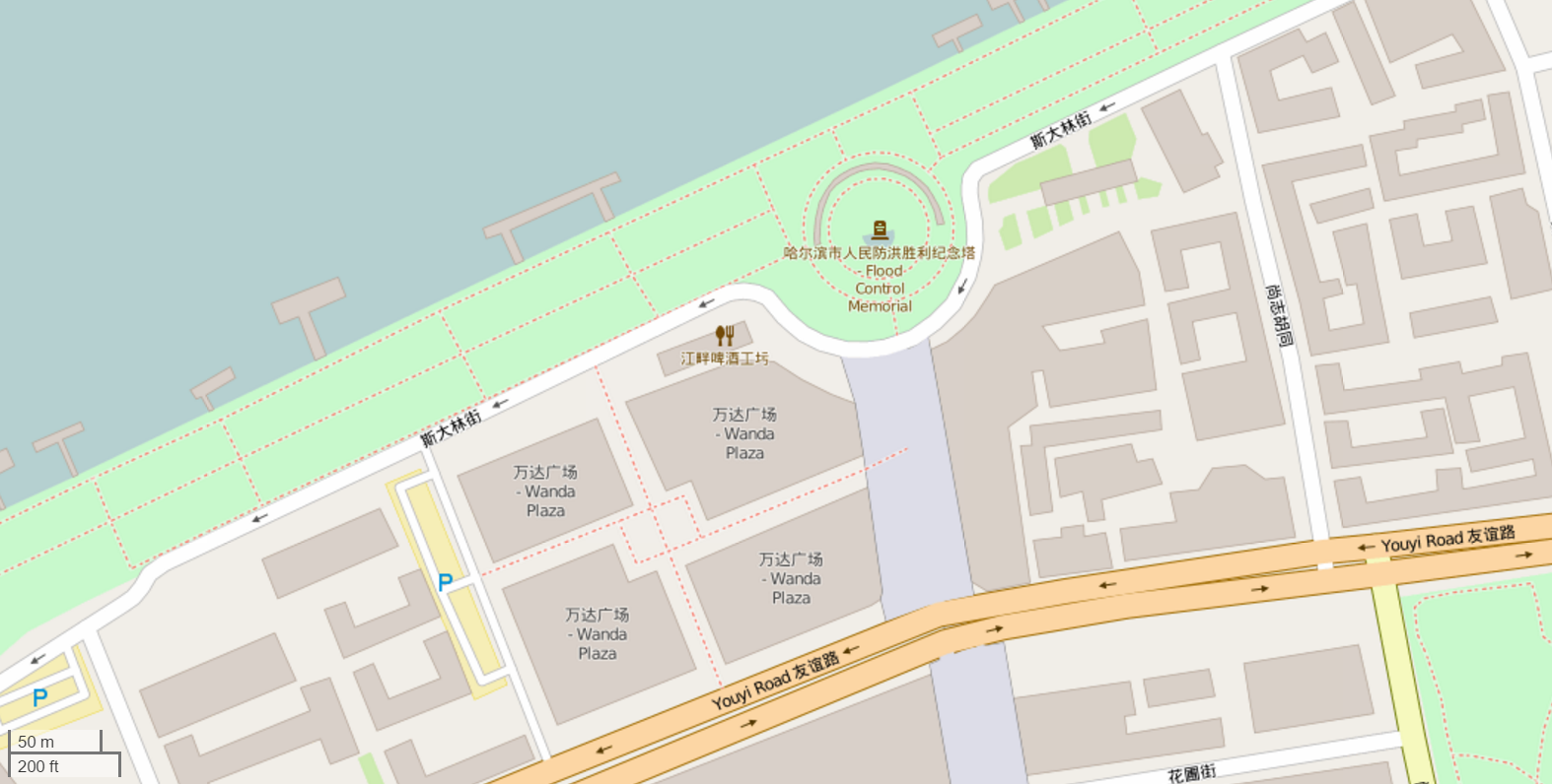 中文（香港）: 防洪紀念塔的位置